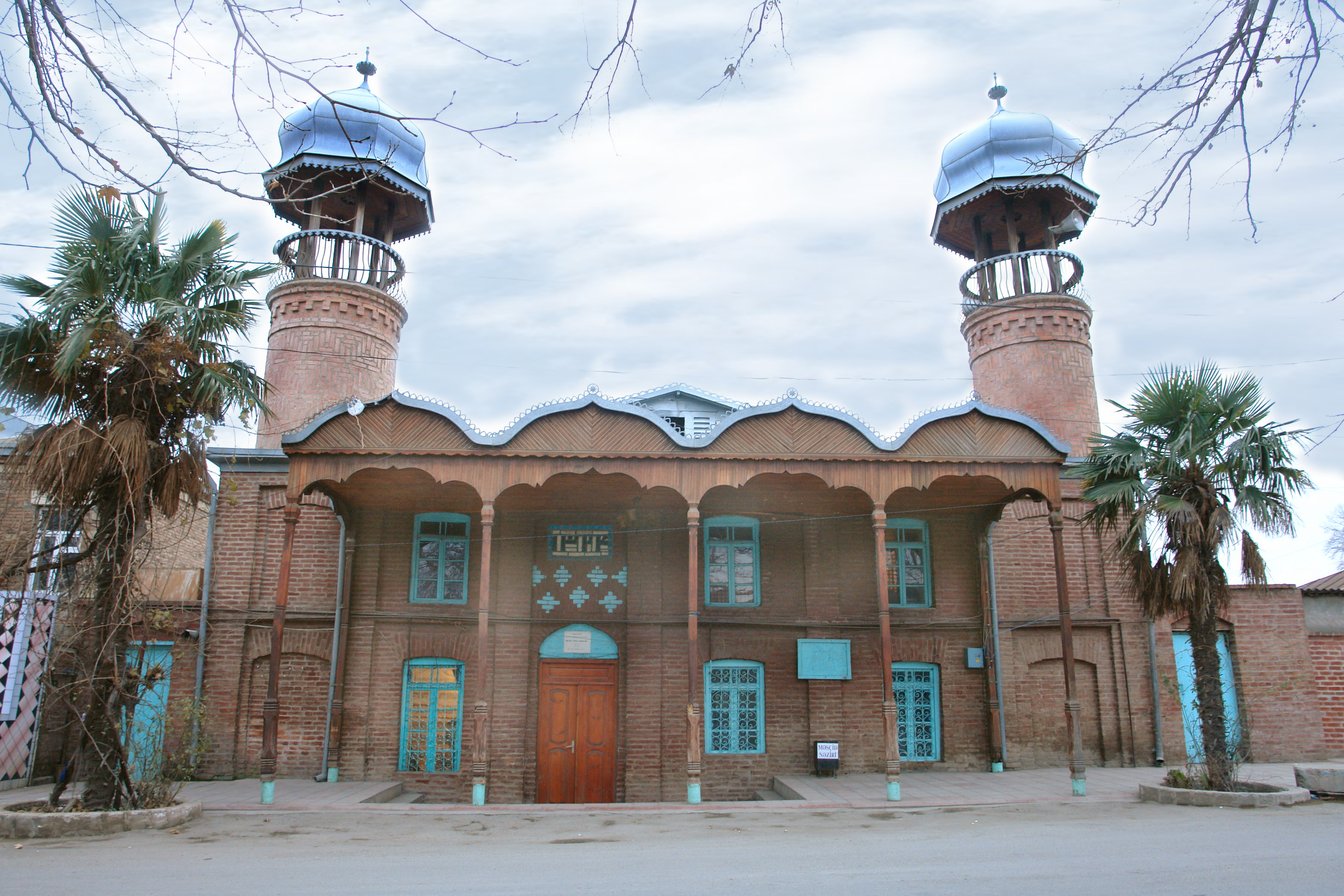 Bərdə Cümə məscidi-Bərdə şəhərində yerləşən qədim məscid (1905)